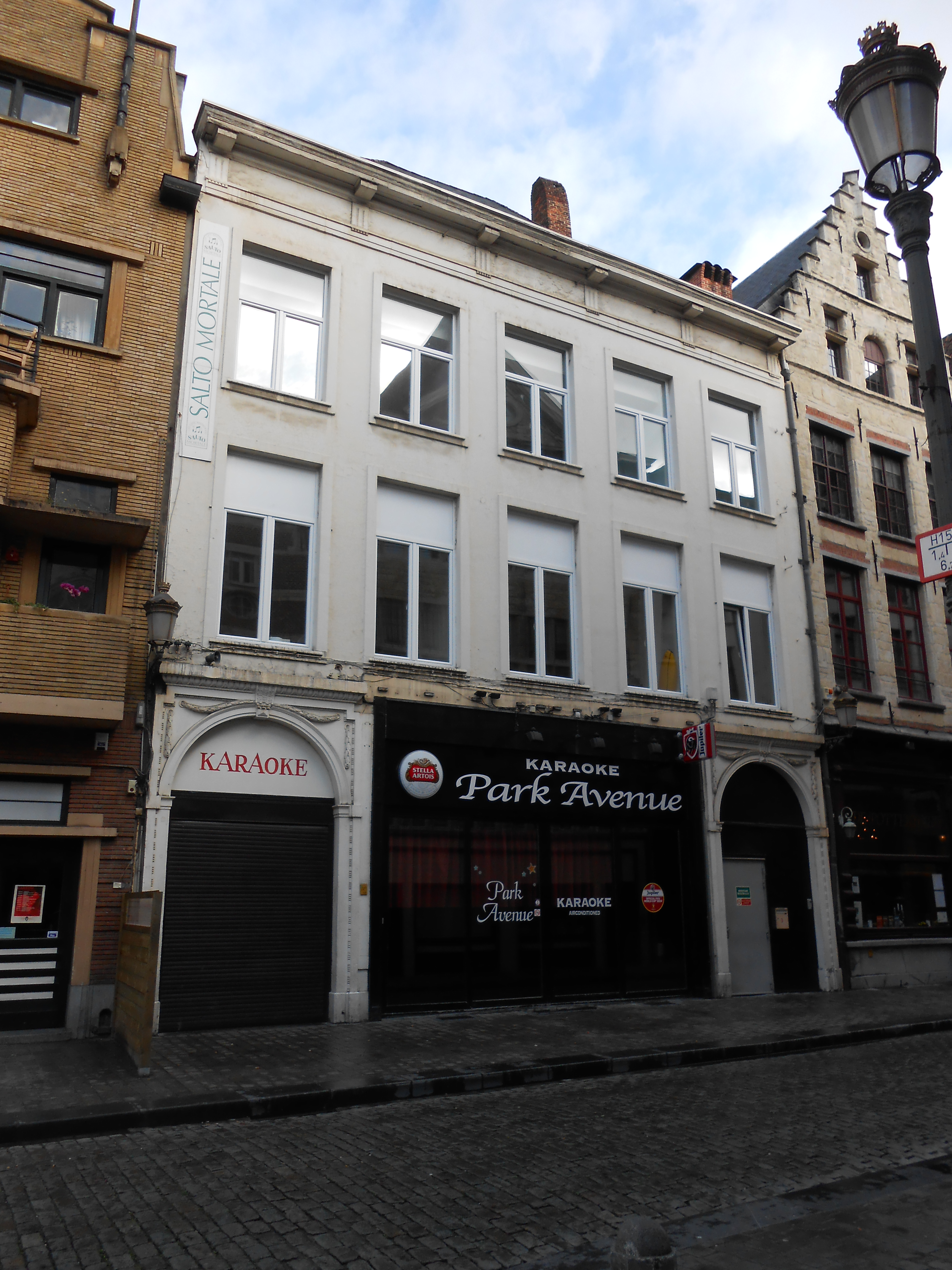 Kaasrui 3 Antwerpen. Classicistisch breedhuis, "Leliënborch", Zoeten Naem Jhesus en Oude Wage of Gulden Voet.